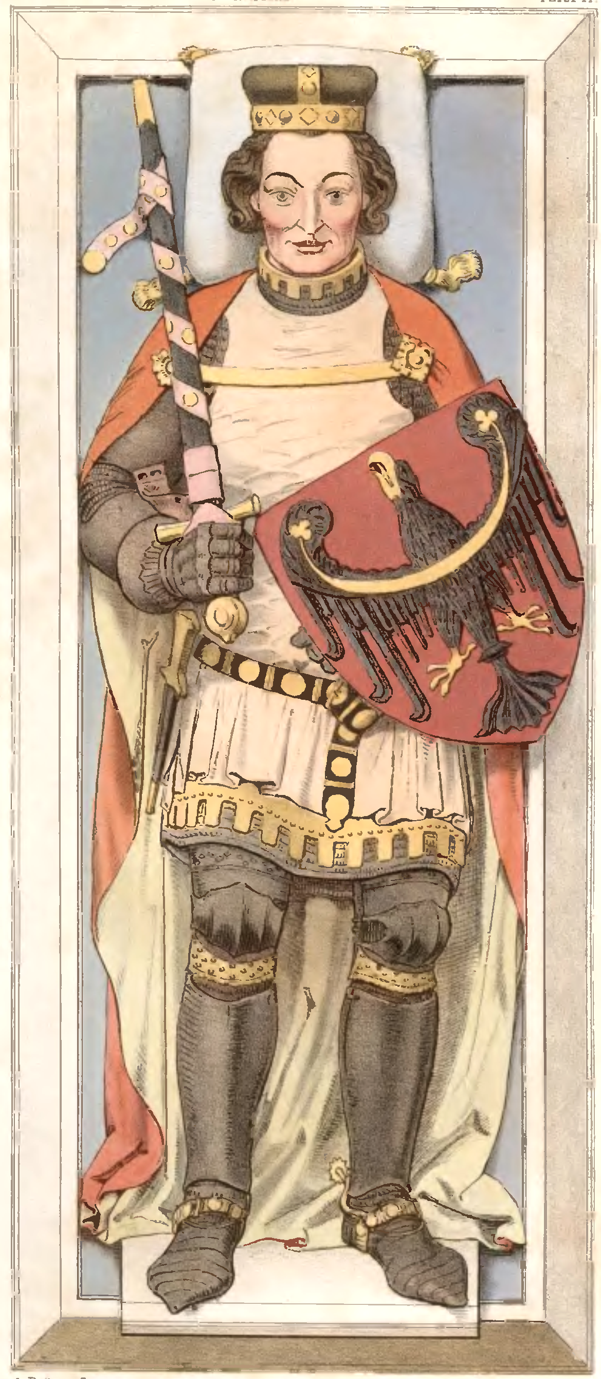 Henryk VI Dobry tomb effigy